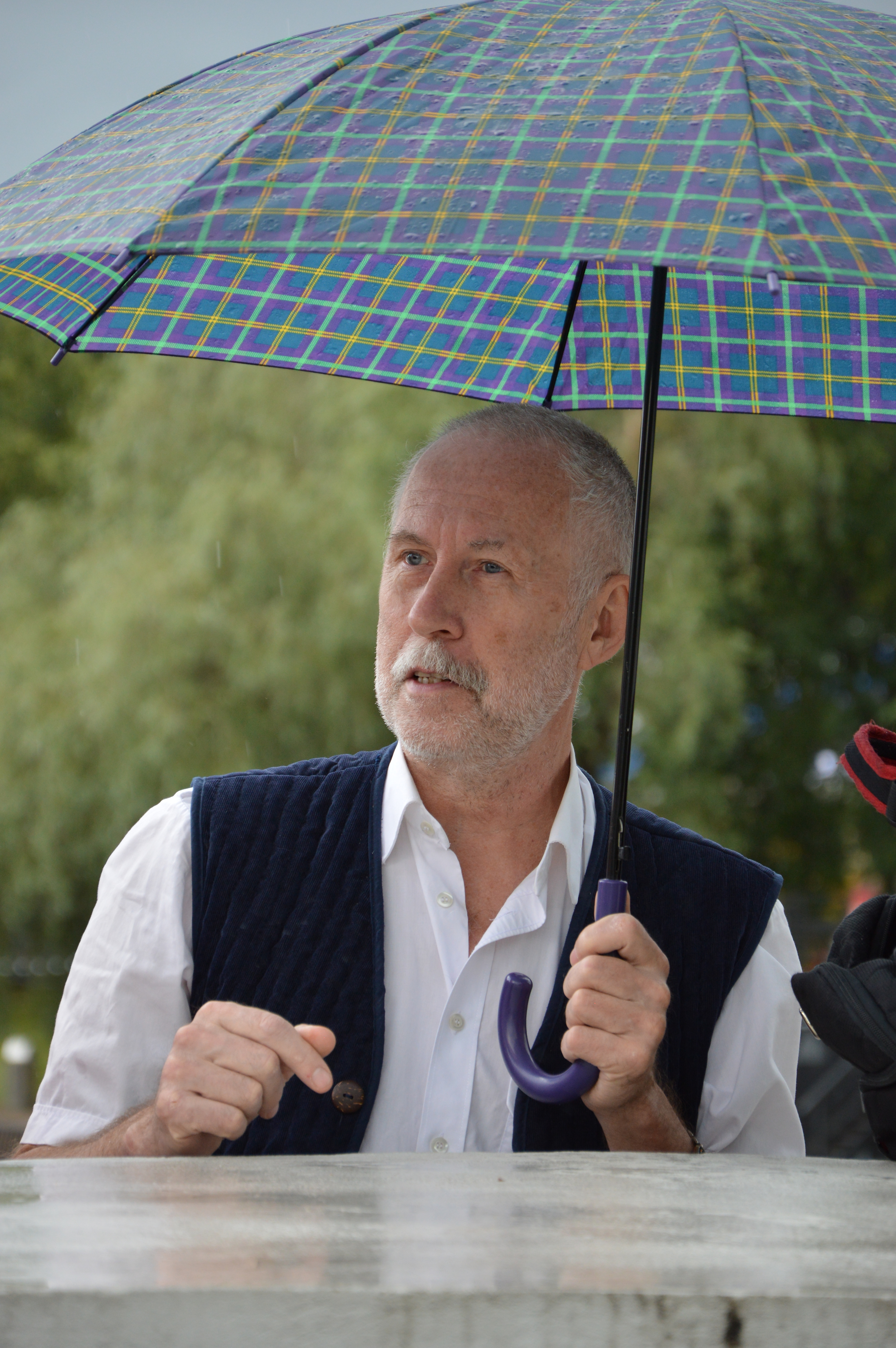 Peeter Vähi Tartu Kaarsillal.